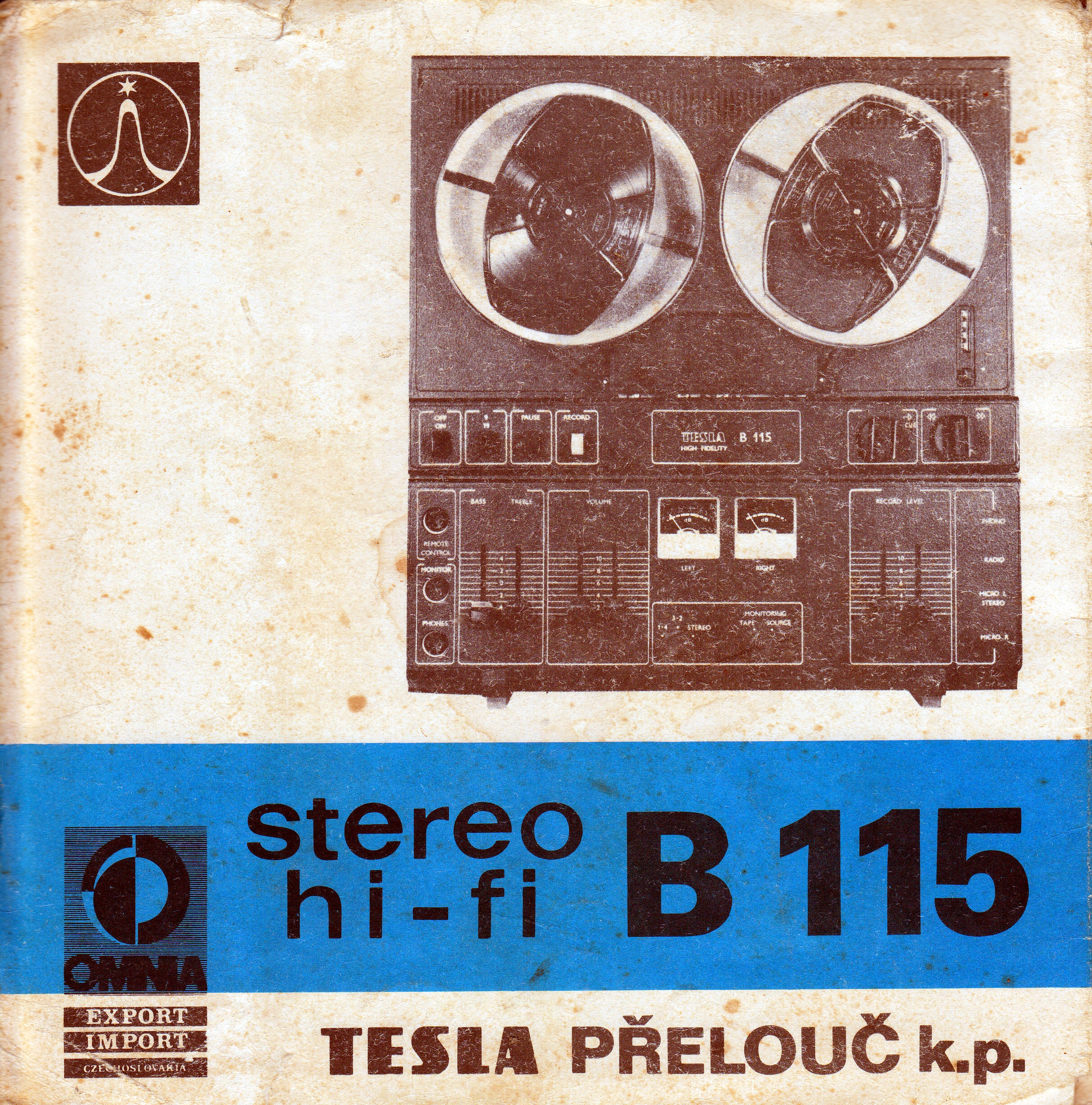 Příručka a na ní foto magnetofonu Tesla B 115